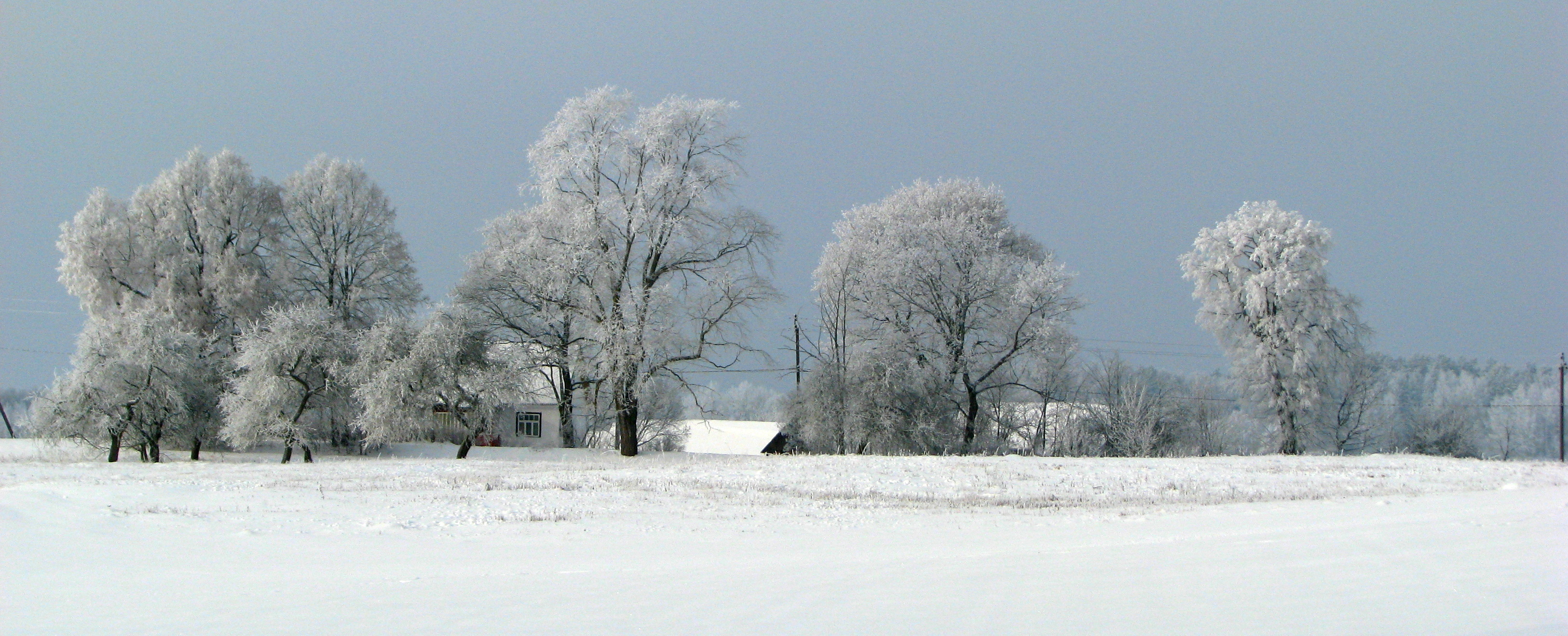 Lausgeniai, žiemą